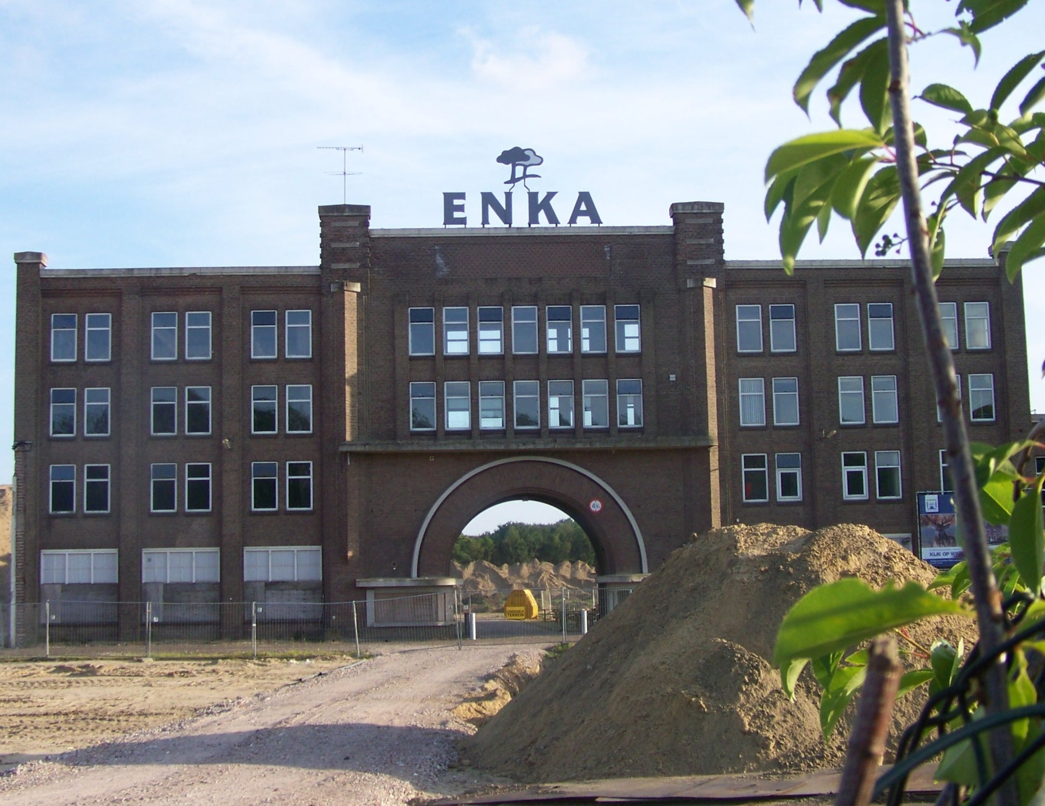 Poortgebouw als onderdeel van westvleugel met poort 1928